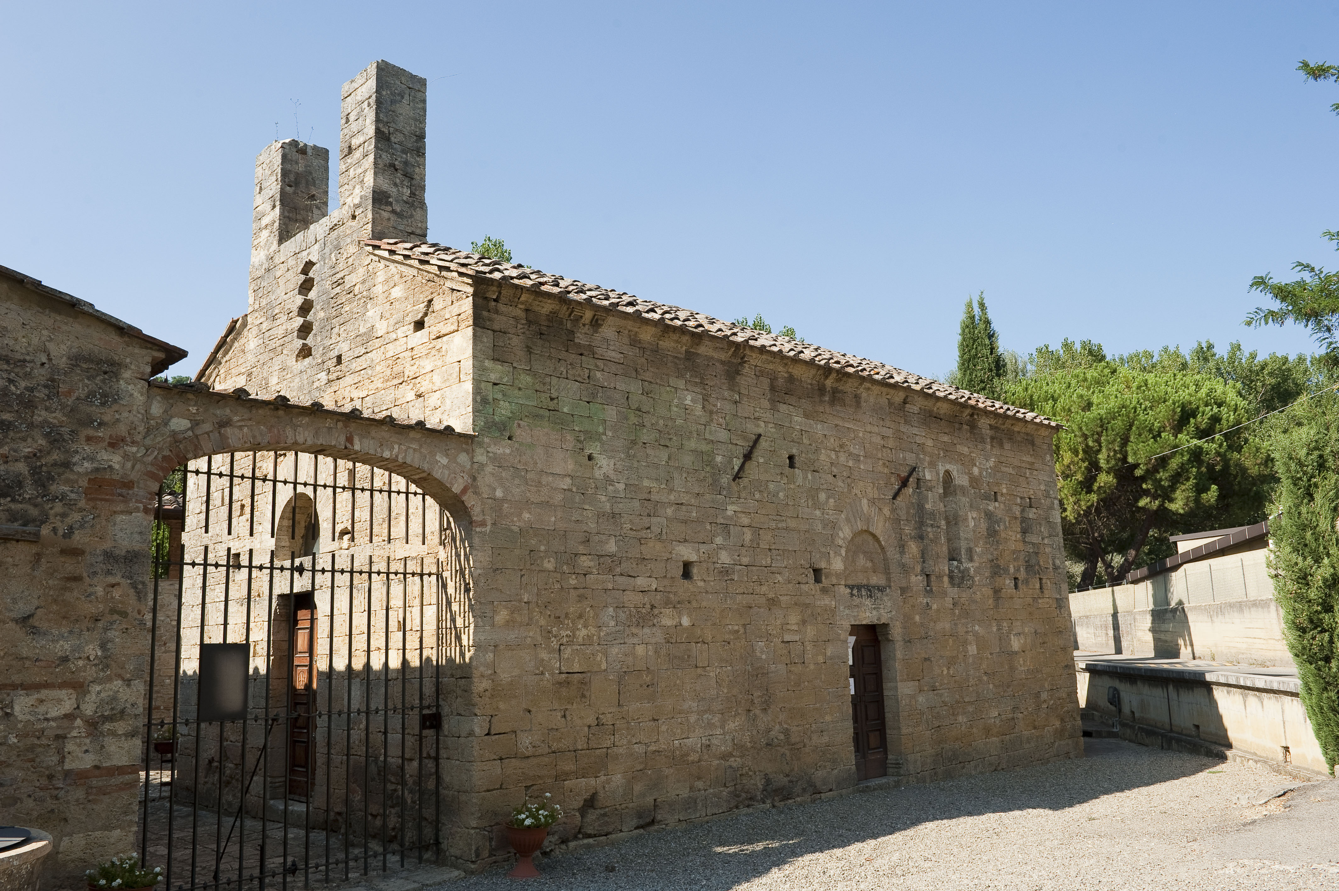 Chiesa di San Giovanni in Jerusalem alla Magione (Poggibonsi)